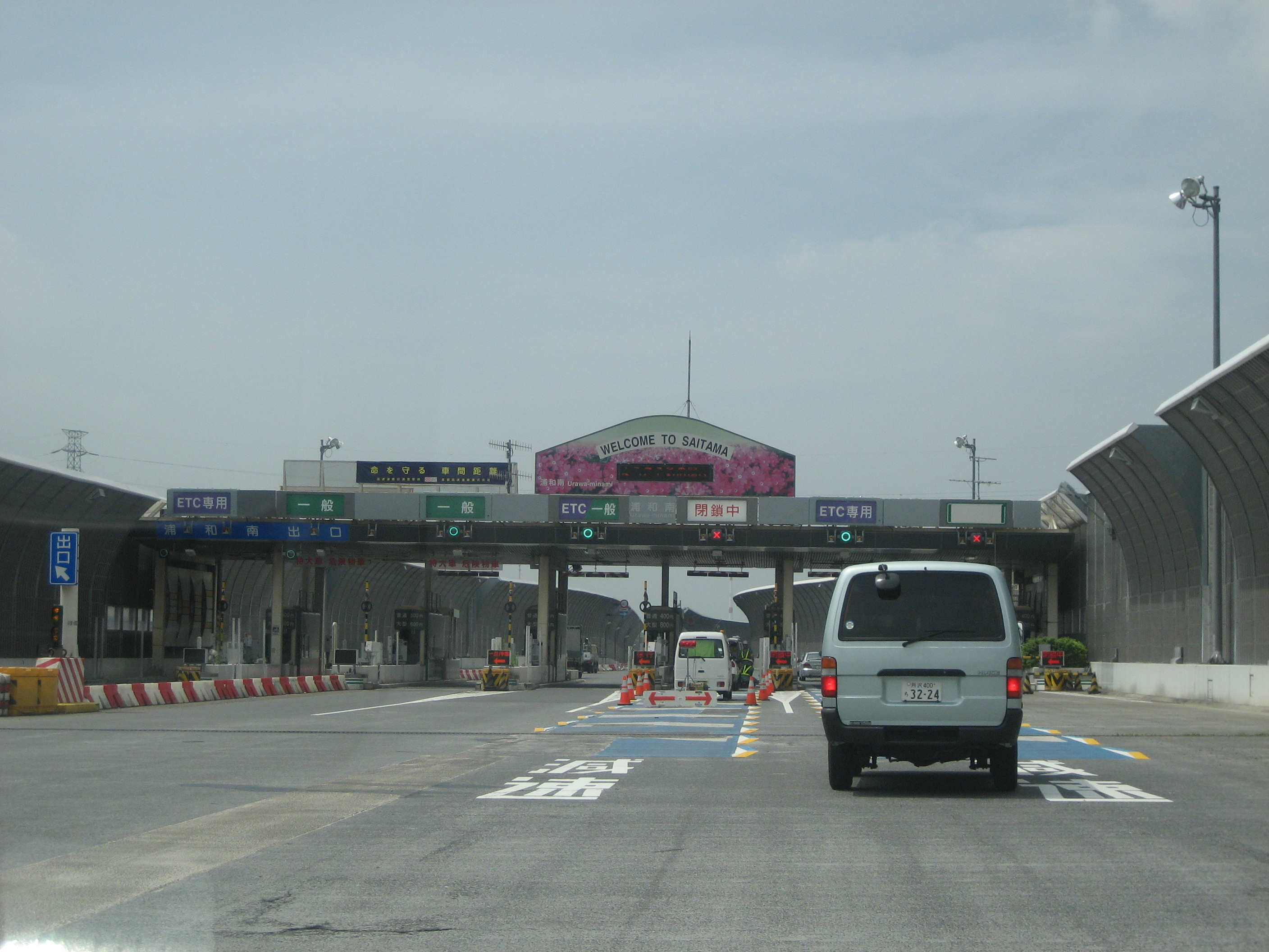 首都高速埼玉大宮線浦和南料金所